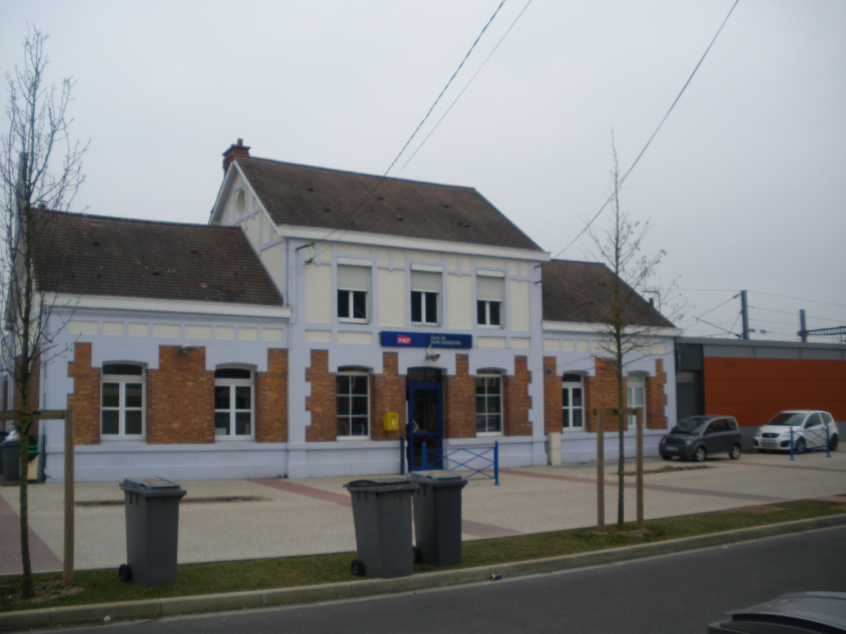 Vue de la gare de Don - Sainghin.